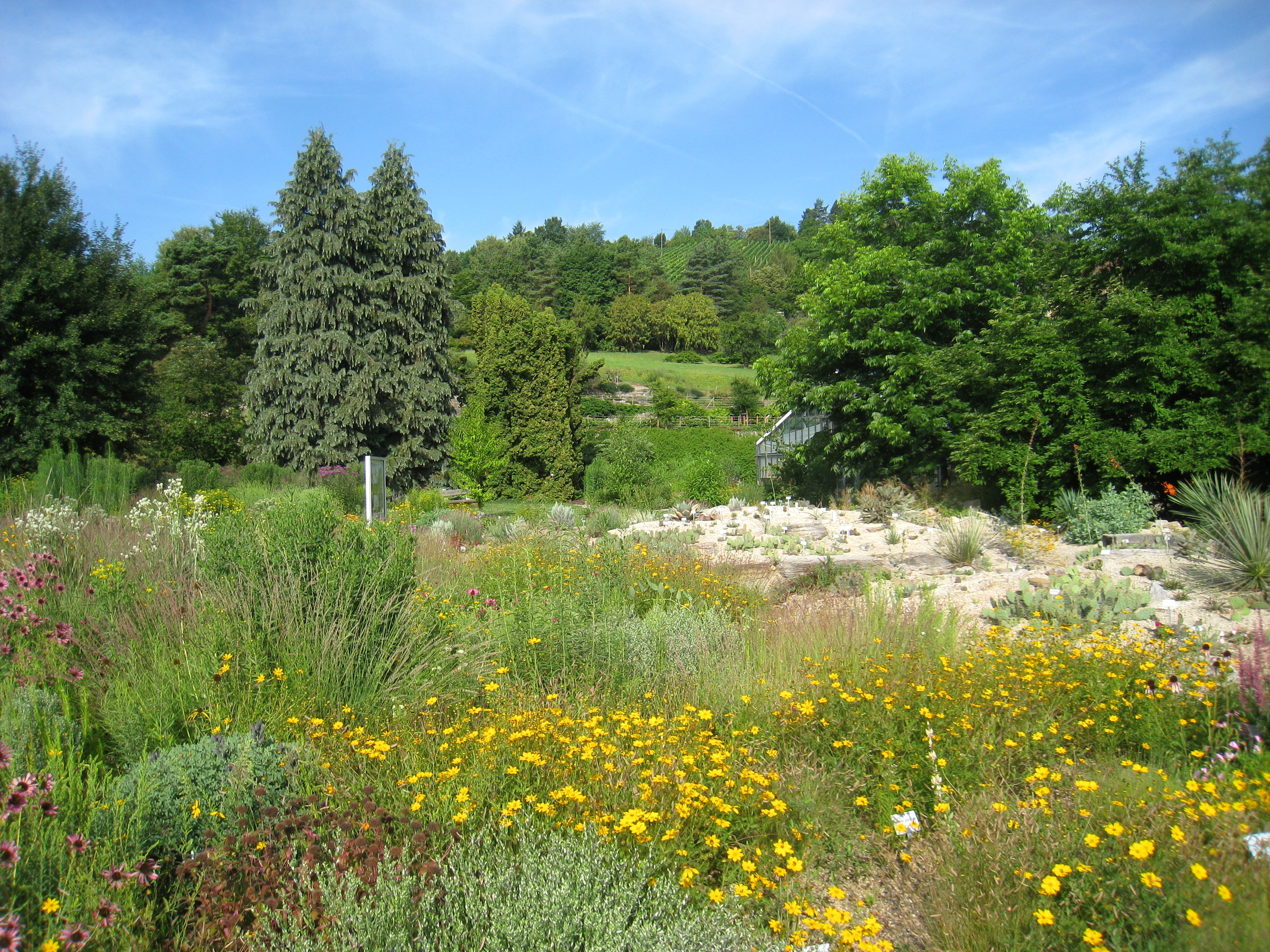 General view - Botanischer Garten der Universität Würzburg, Würzburg, Germany.